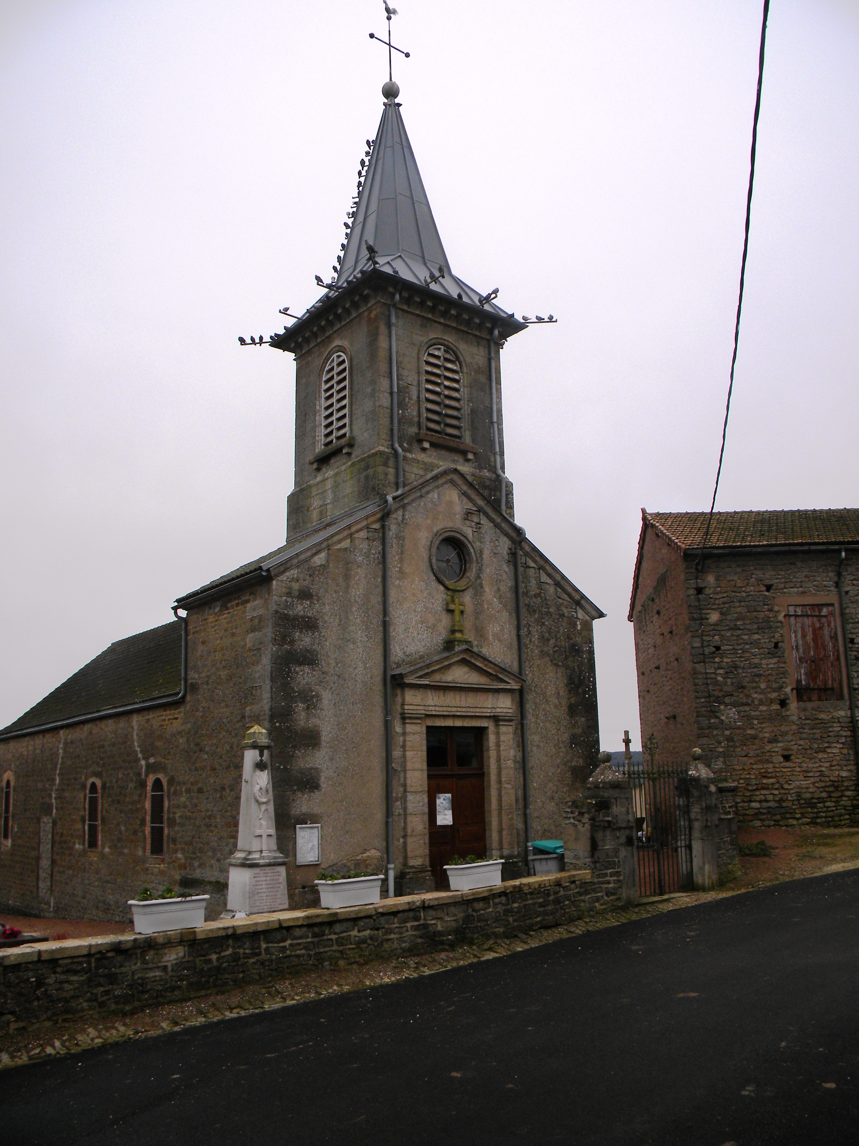 Preĝejo